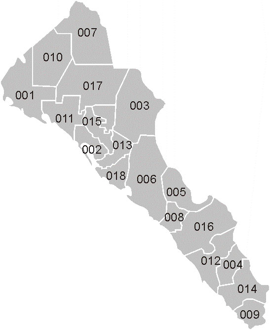 Mapa de la división municipal del estado mexicano de Sinaloa